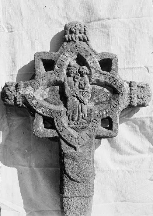 Imatge